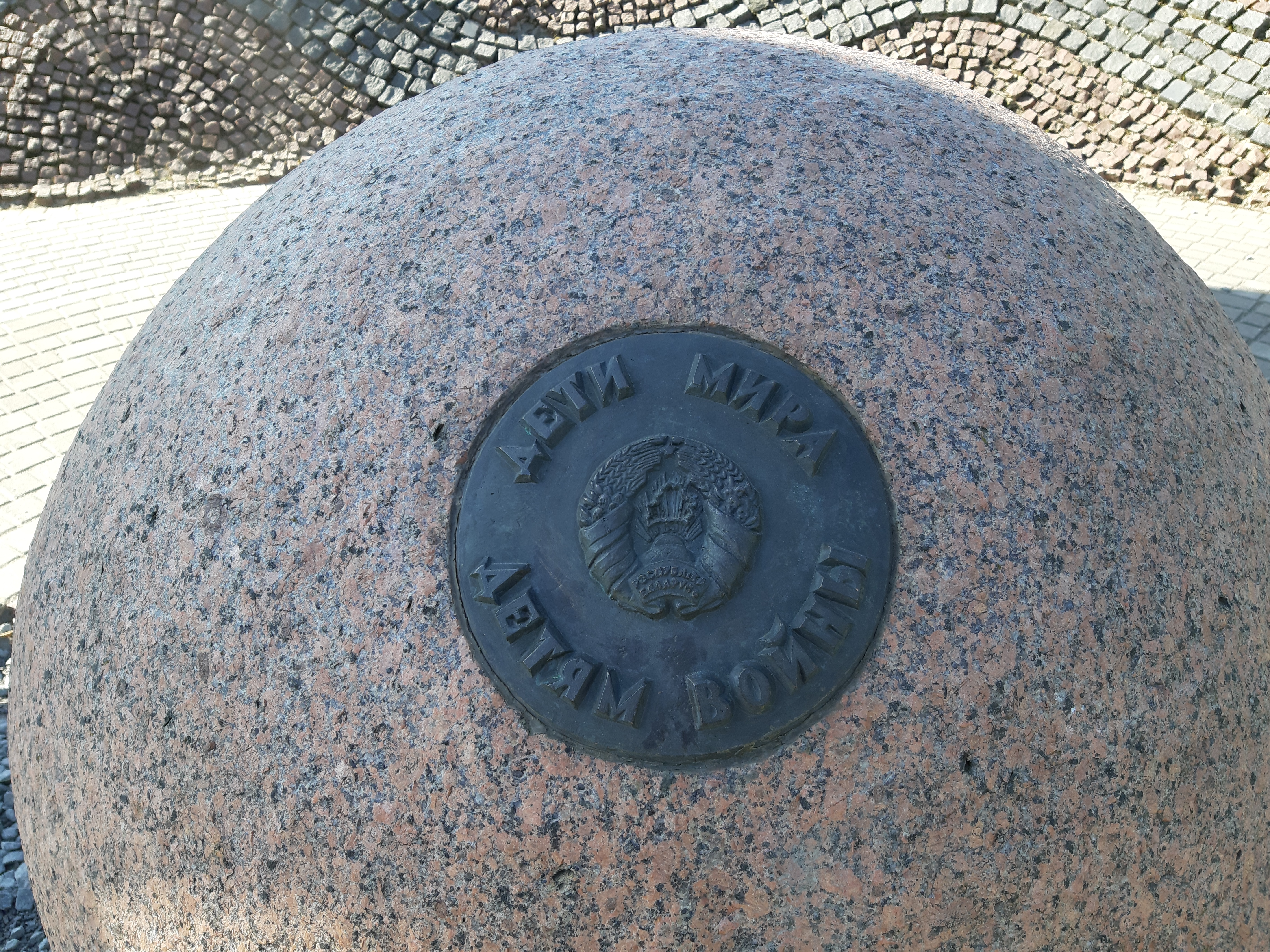 Магілёў. Дзеці міру — дзецям вайны